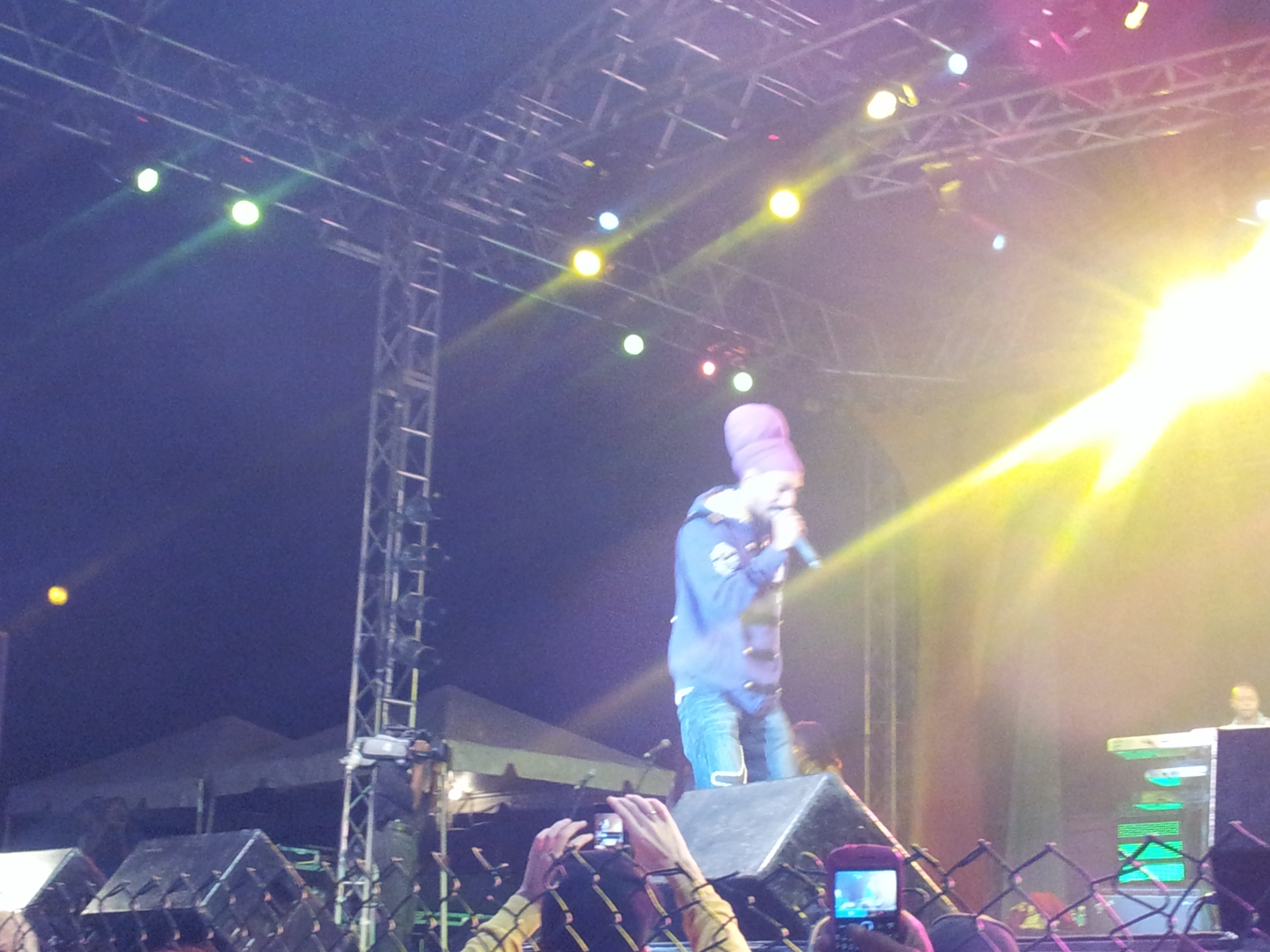 Cali P at Rebel Salute